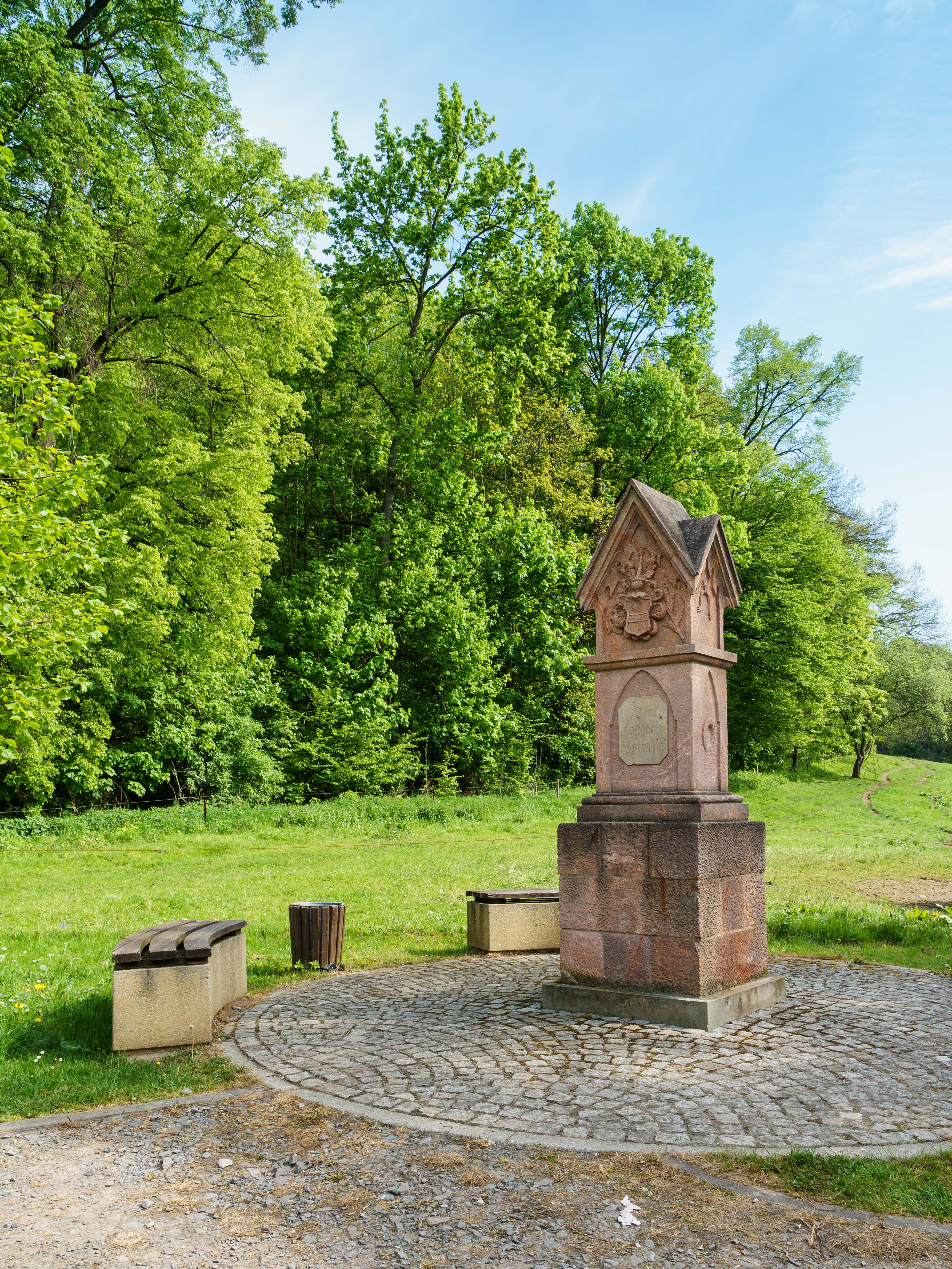 Harrasdenkmal neben der Schlossmühle in Lichtenwalde Text: Dem tapfern Springer